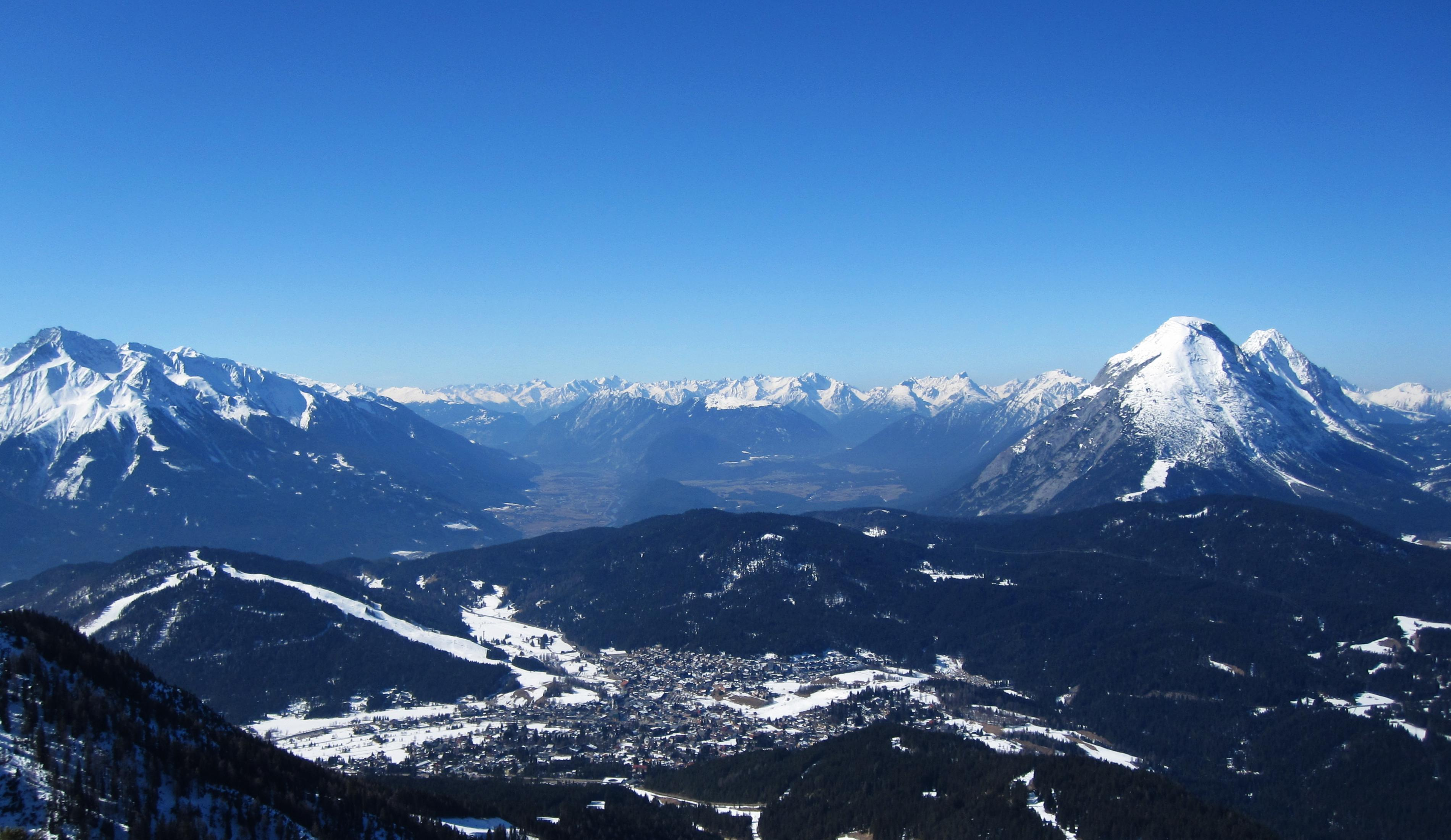 Oberinnal, Blick vom Seefelder Joch Richtung Lechtaler Alpen